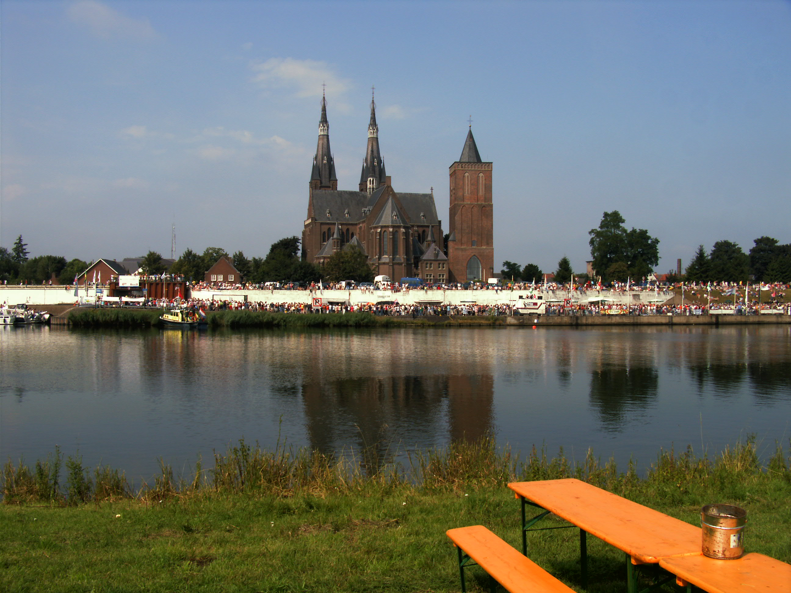 nijmegen 4daagse anno 2004 in Cuijk